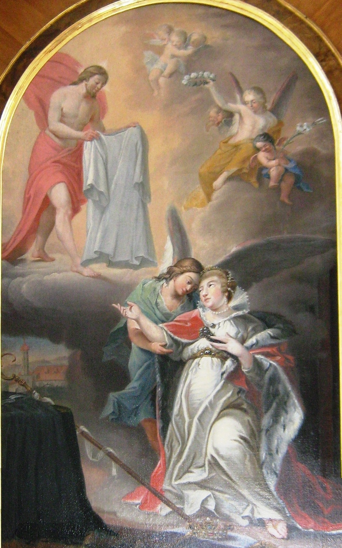 Anhausen, St. Adelgundis, linker Seitenaltar, Altarbild